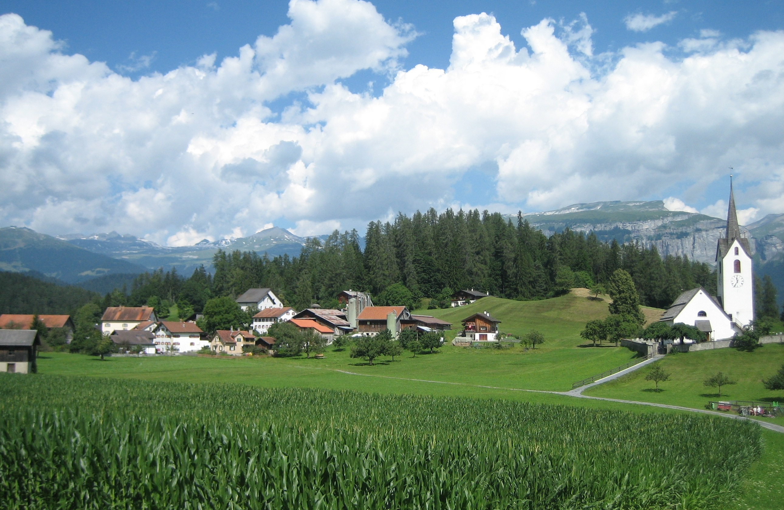 Versam GR